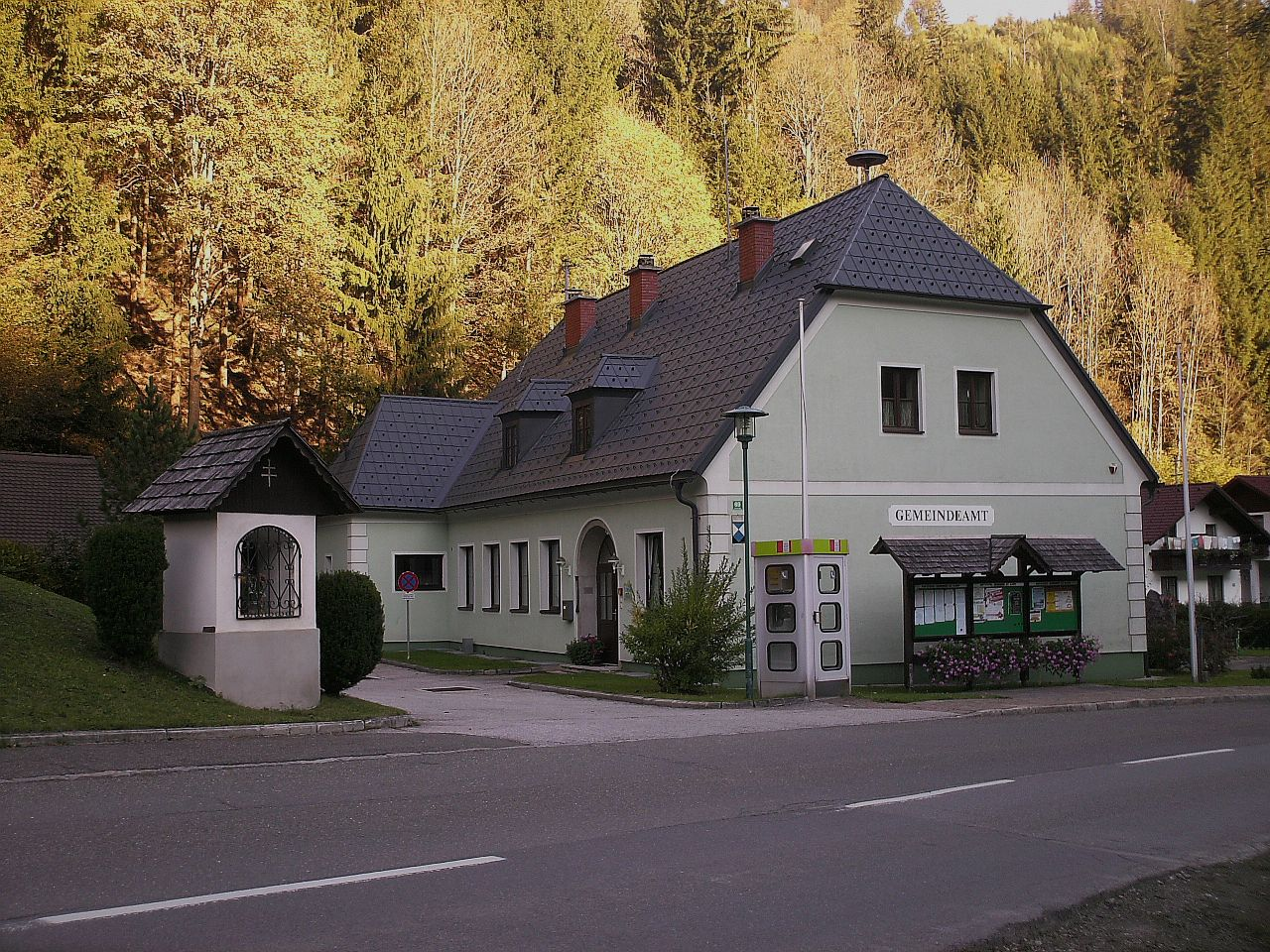 Rathaus/Gemeindeamt St. Ilgen/Österreich.